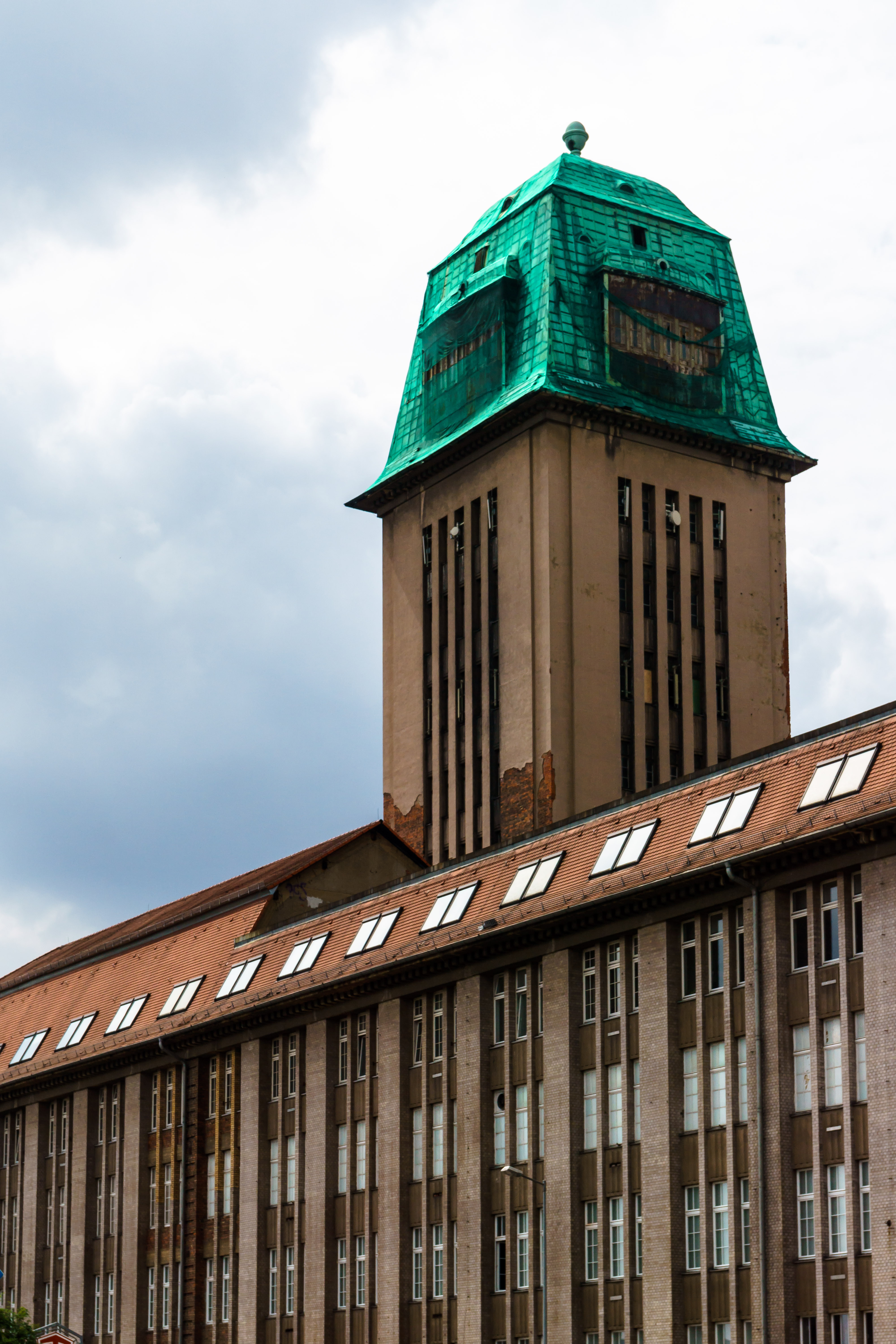 Wasserturm der ehemaligen Hupfeld-Werke, Ludwig-Hupfels-Straße in Leipzig-Leutzsch